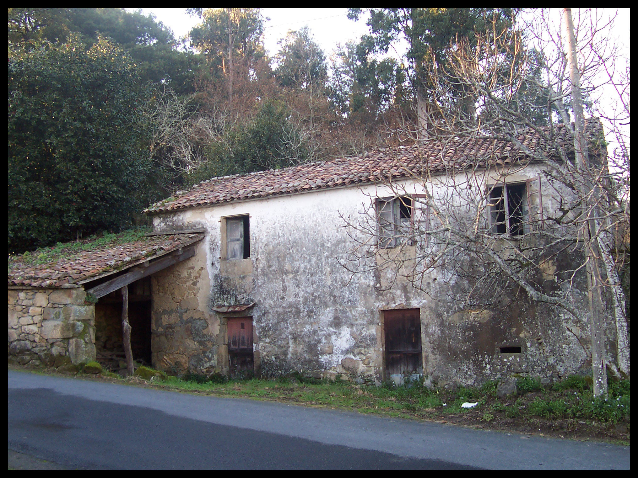 Castrigo